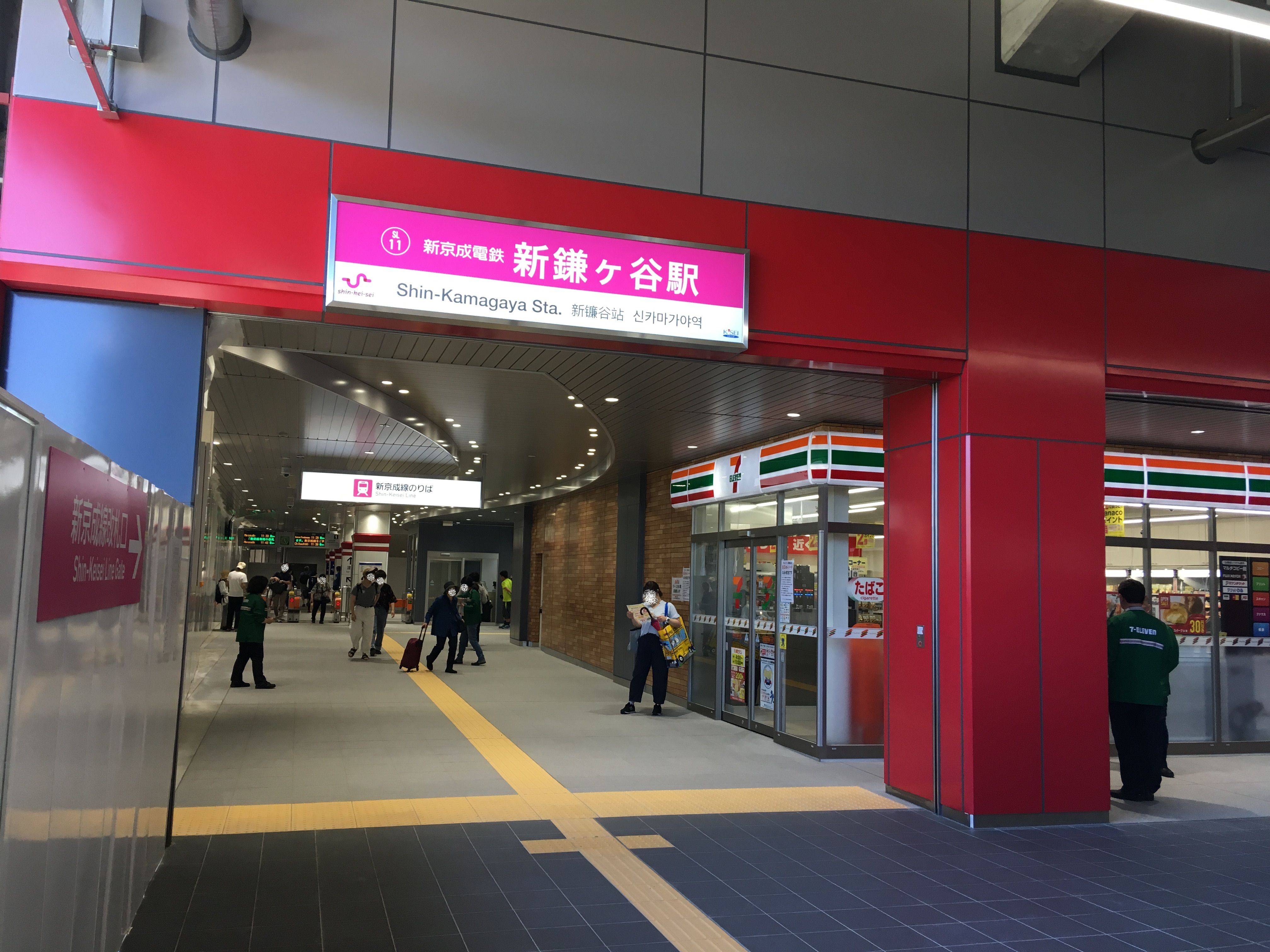 新京成電鉄新鎌ヶ谷駅舎入口